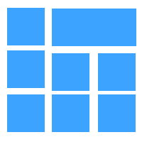 高雄市立海青高級工商職業學校校徽